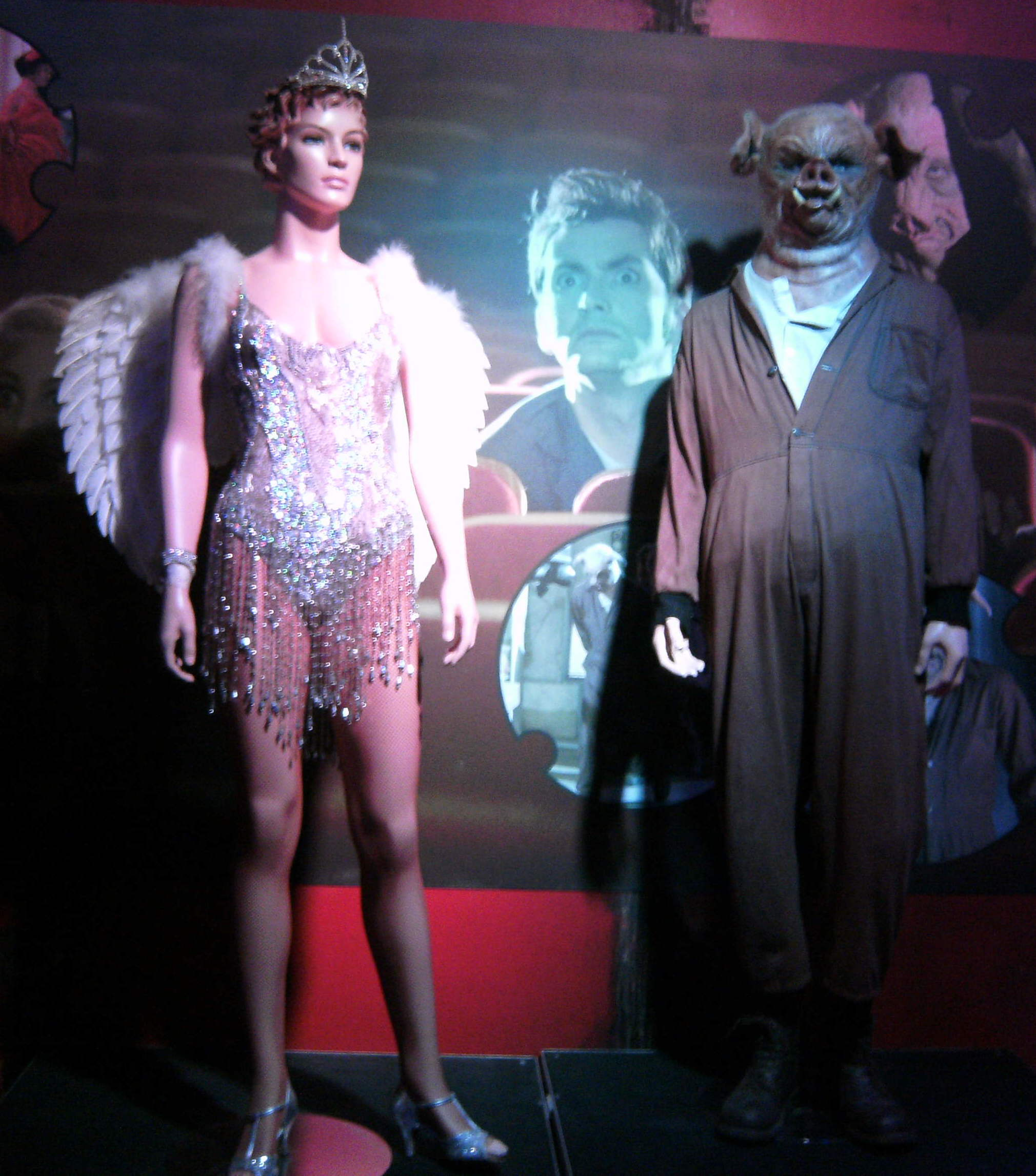 Rollei Doctor Who Experience